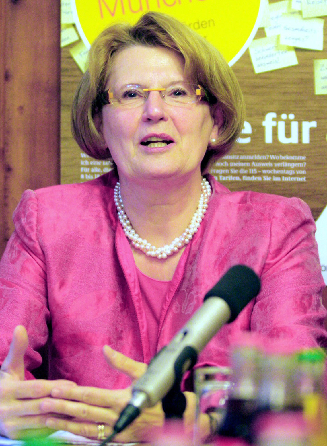 Cornelia Rogall-Grothe, deutsche politische Beamtin. Seit Februar 2010 Beauftragte der Bundesregierung für Informationstechnik und beamtete Staatssekretärin im Bundesministerium des Innern.